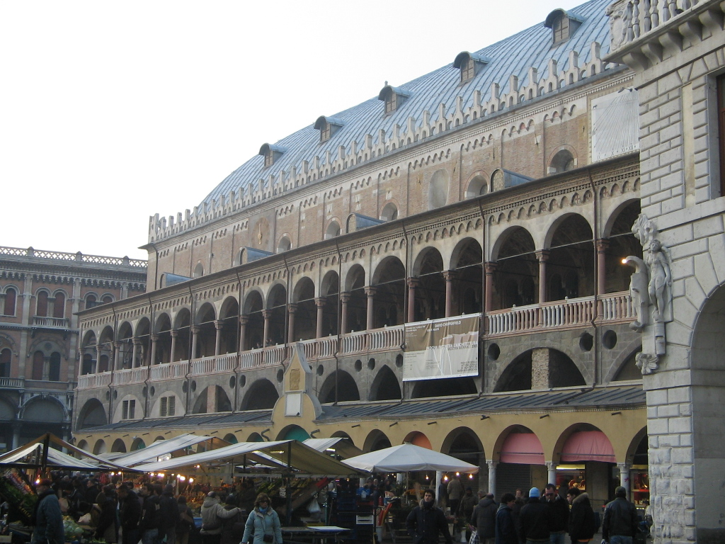 Vista di Piazza delle Erbe, Padova - Italia, con l'omonimo mercato e la facciata del Palazzo della Ragione. A view of Piazza delle Erbe, Padua - Italy, with the market and the Palazzo della Ragione. Made by Piero tasso the 22 of January, 2006